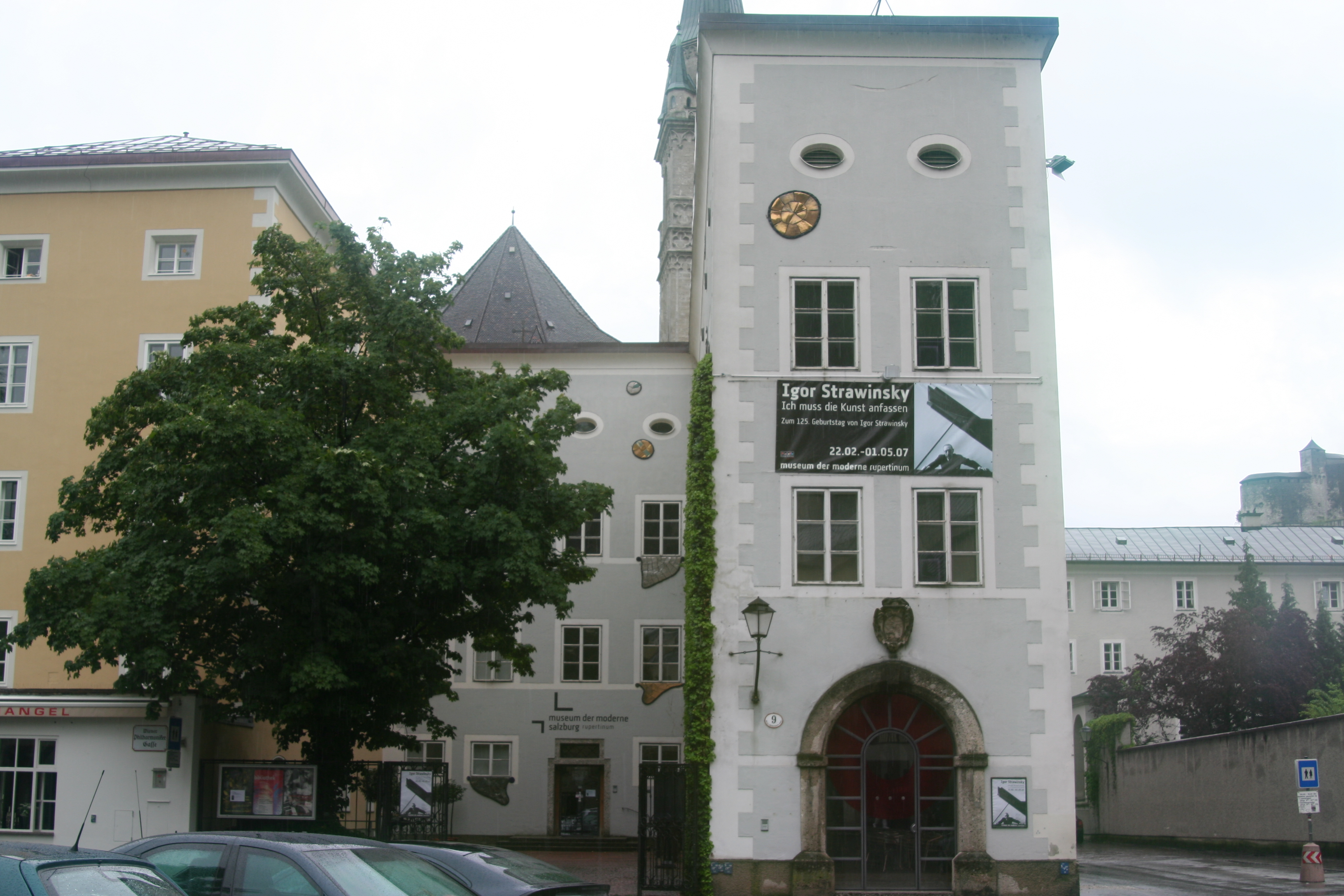 Rupertinum